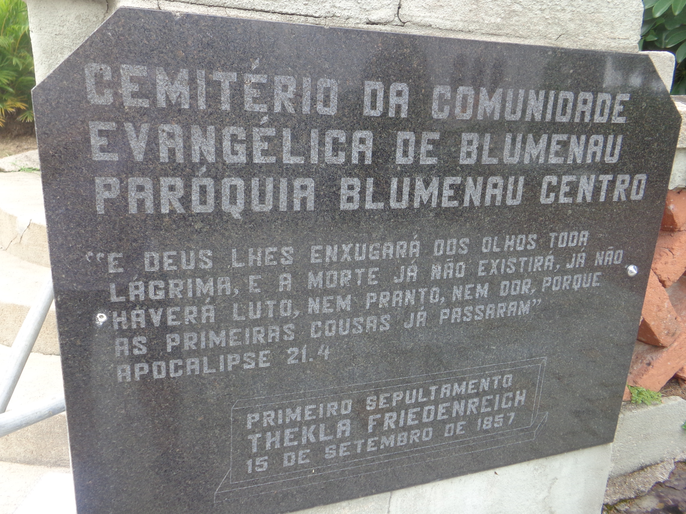 Placa Entrada Cemitério Luterano Blumenau Centro